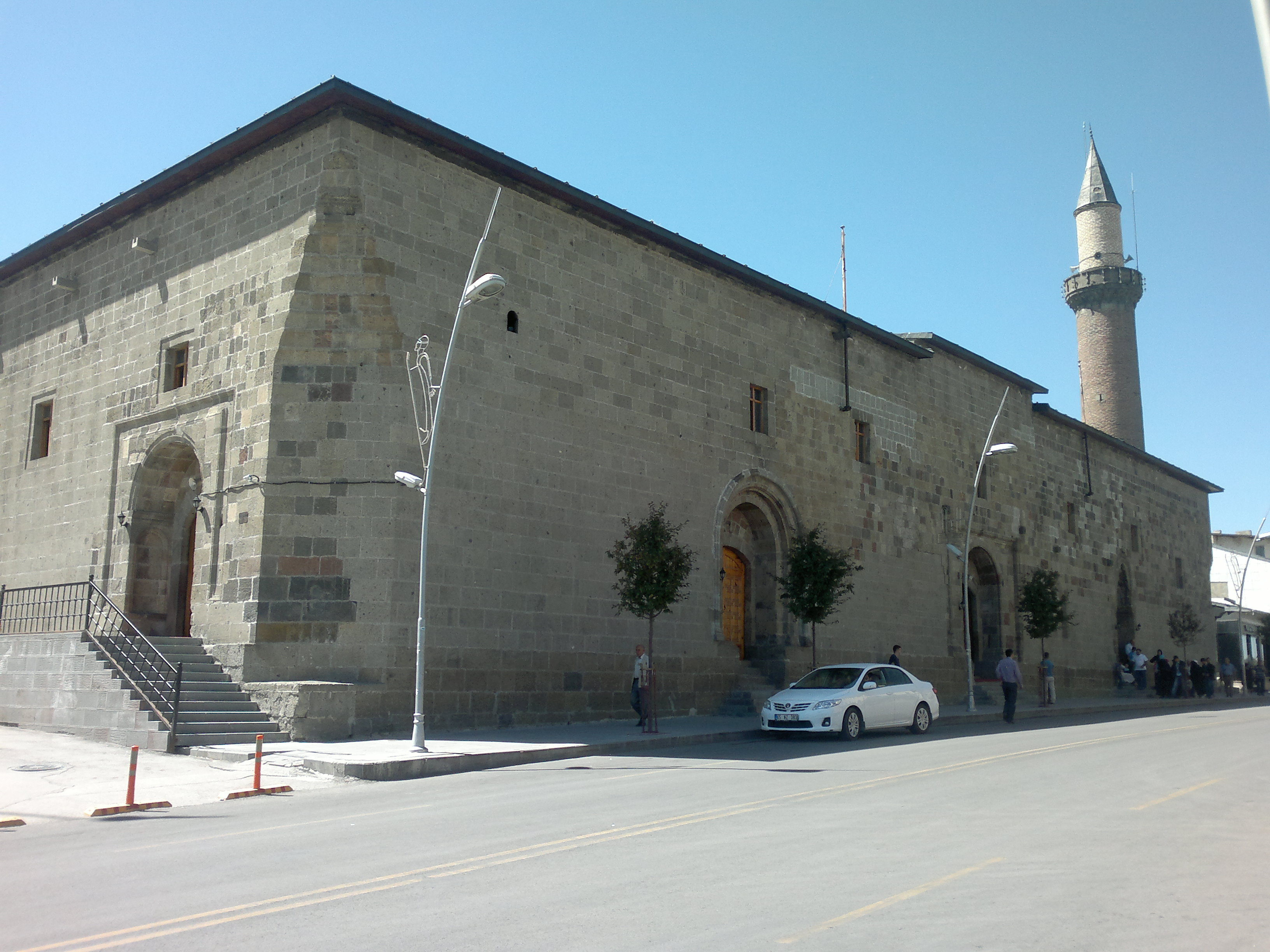 Erzurum Ulu Camii dış görünüm